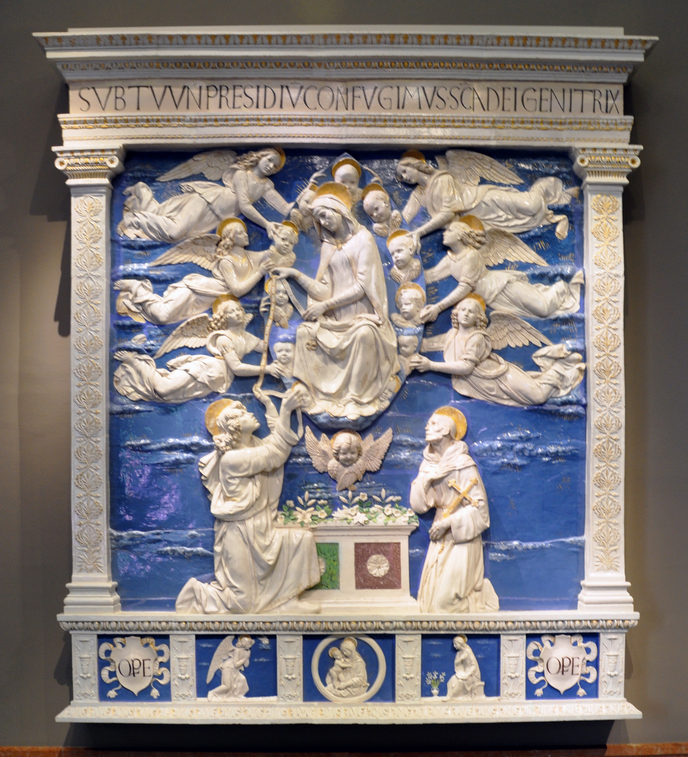 Altar der Himmelfahrt Mariae (Madonna della Cintola), Florenz um 1500, glasierte Terrakotta, Höhe 282 cm Liebieghaus, Frankfurt am Main, Inv. Nr. 191